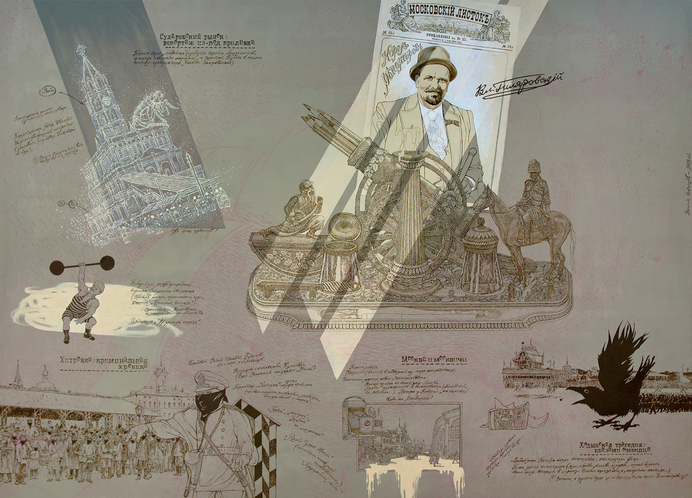 В.ГИЛЯРОВСКИЙ — КОРОЛЬ РЕПОРТЁРОВ. Холст, масло, 200Х150см. 2018 г